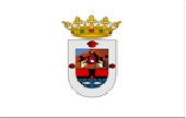 Bandera del municipio de candelaria, tenerife.